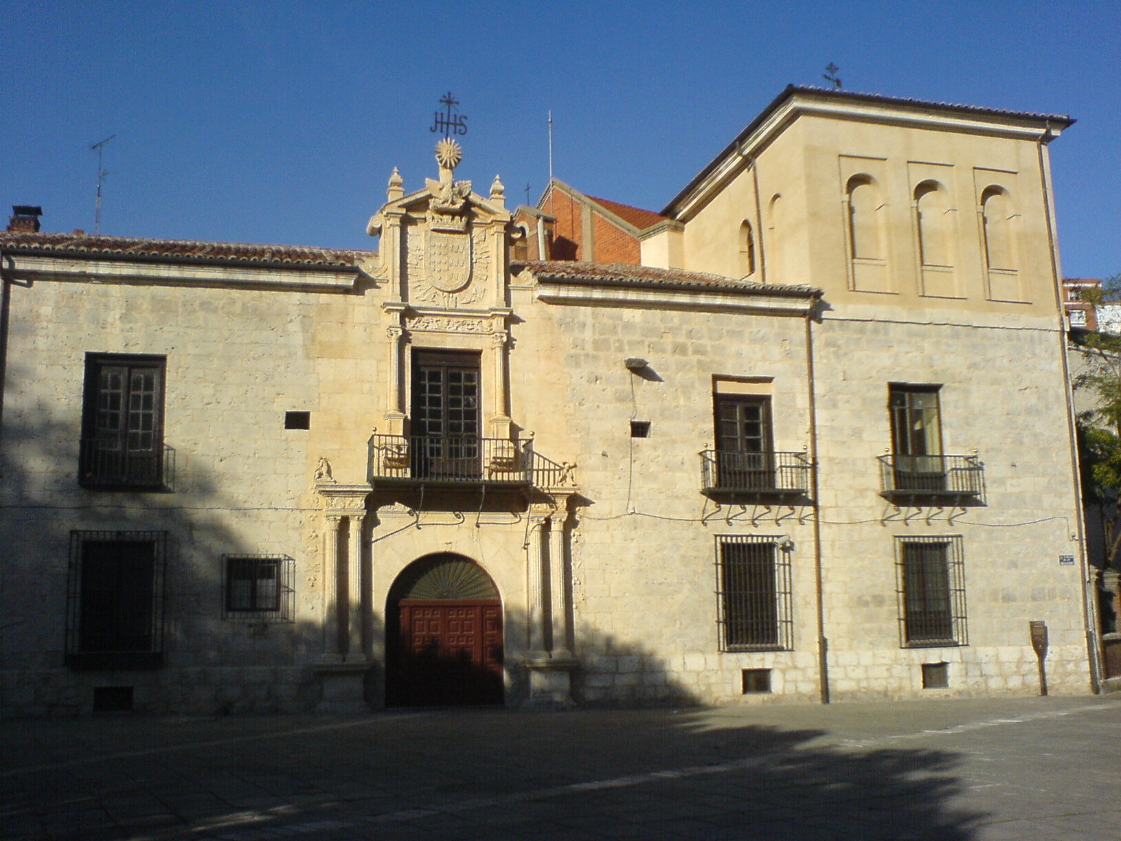 Palacio del Conde de Gondomar en su estado actual, en Valladolid